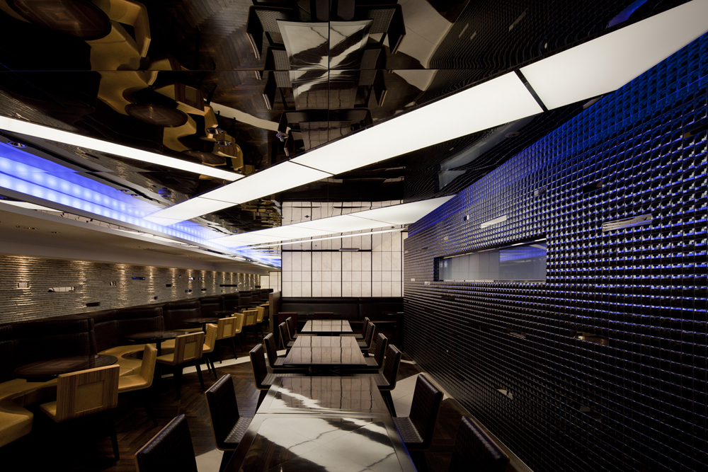 sonypresents